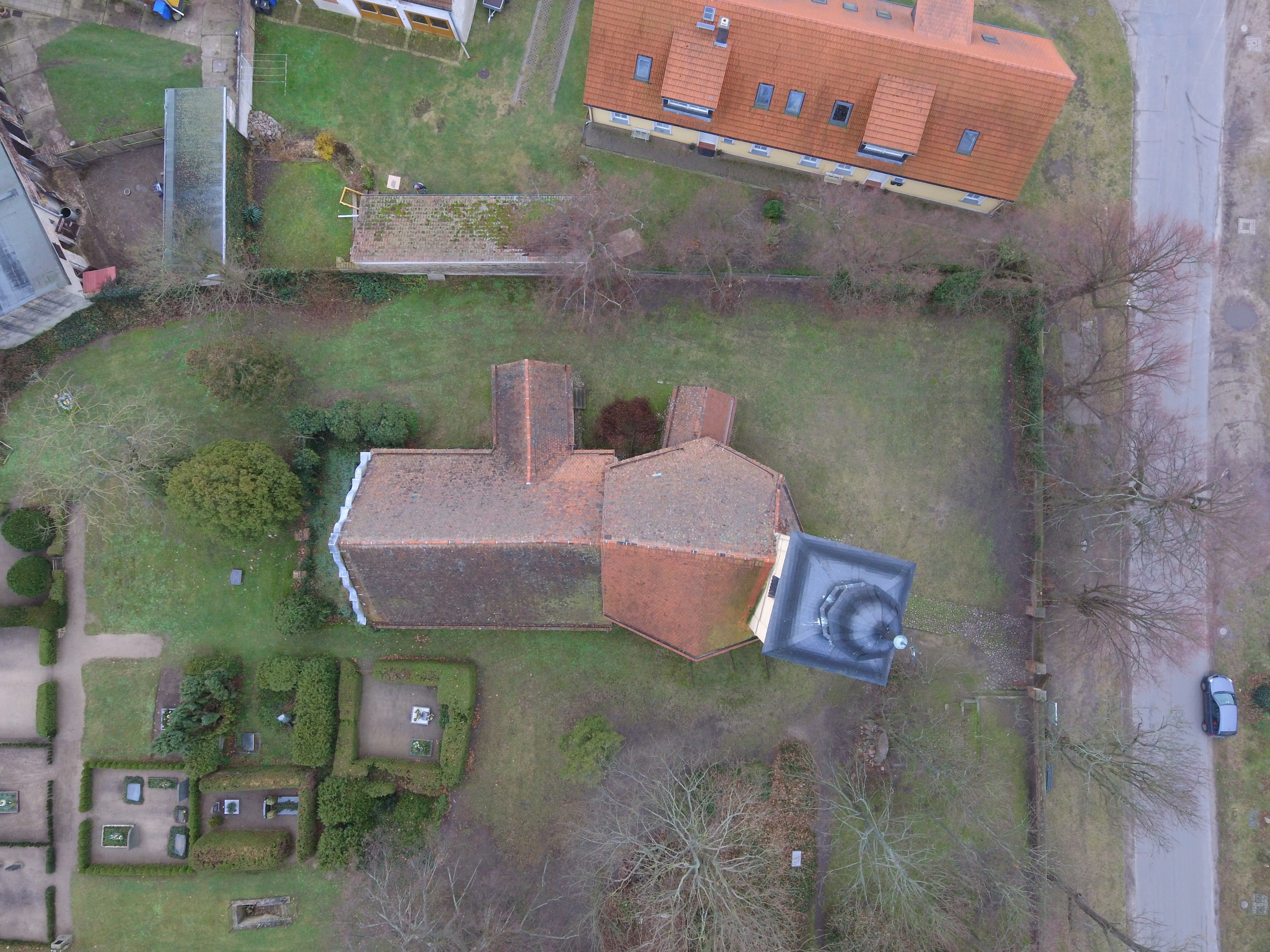 Luftbild Kirche Ketzür